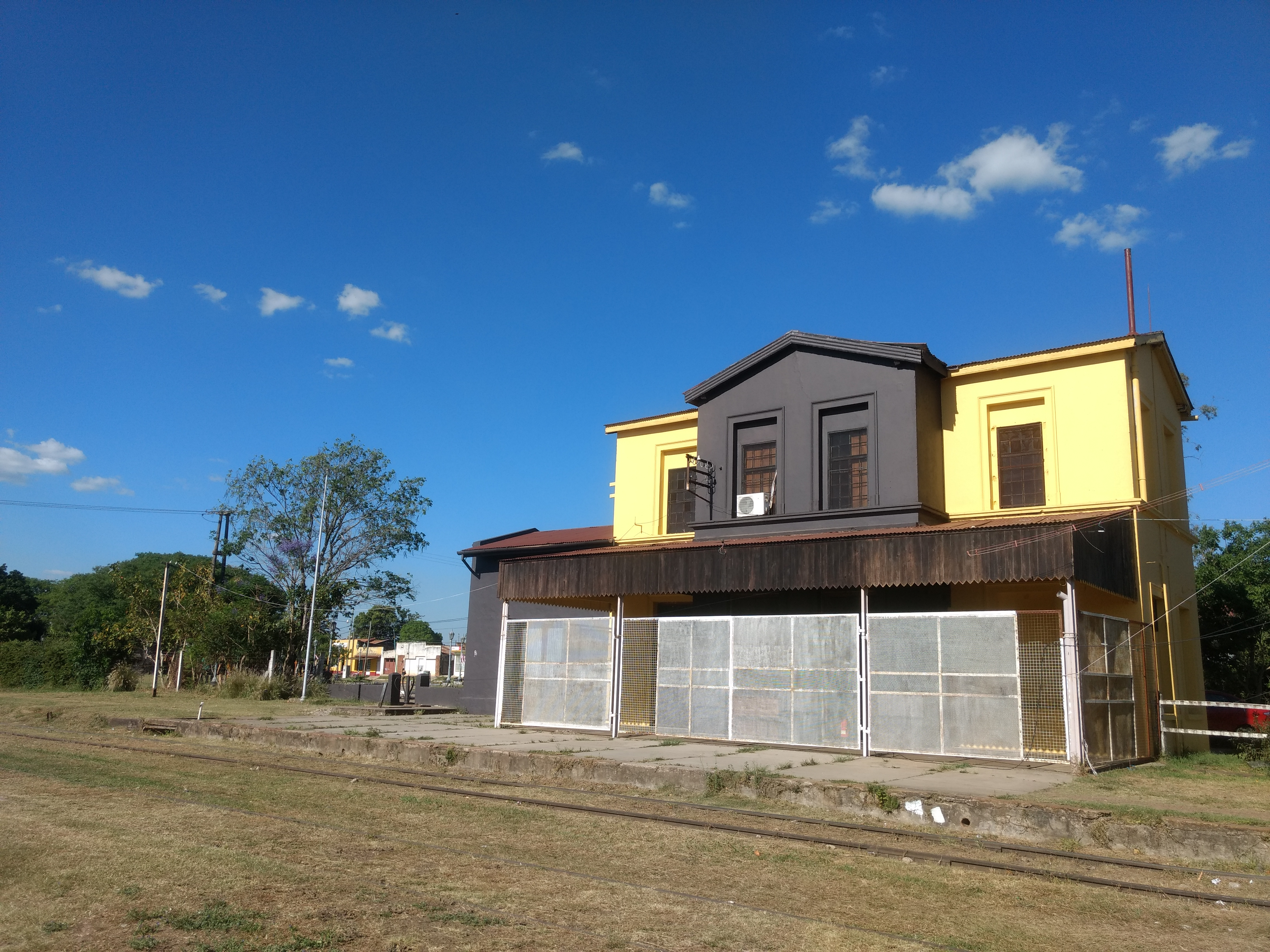 FOTOGRAFIA DE LA PARTE TRASERA DE LA ESTACION MOCORETA